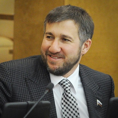 Григорий Викторович Аникеев (род.1972) — российский предприниматель, политический деятель